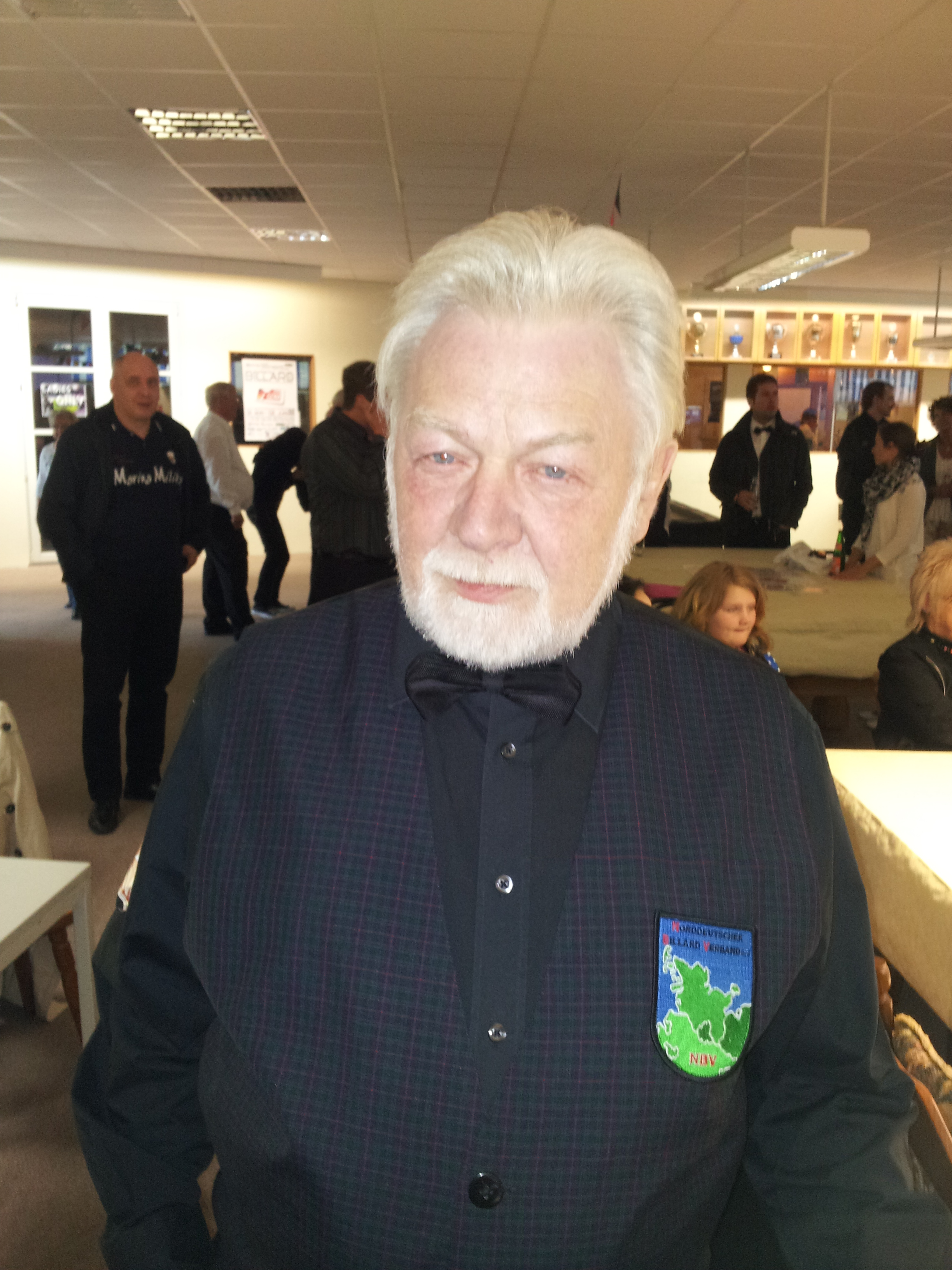 Hans-Jürgen Kühl